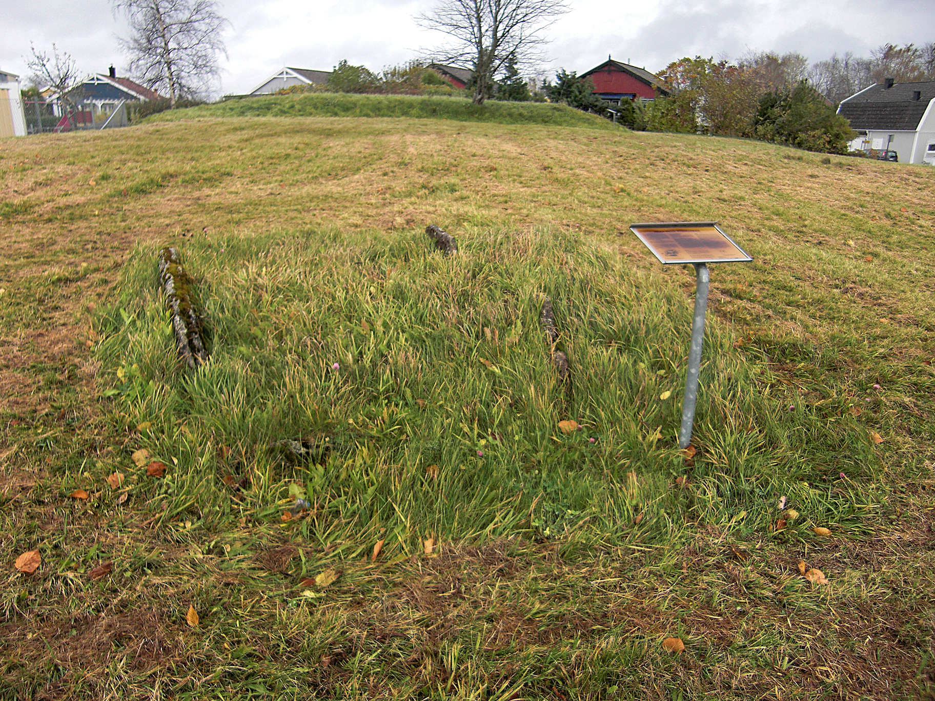 Hällkistan vid Skytten (RAÄ-nr Falköping 5:2) i Falköping, Falköpings kommun, f.d. Skaraborgs län, Västergötland, Västra Götalands län, Sverige. I bakgrunden ses en stensättning (RAÄ-nr Falköping 5:1) med av odling kraftigt avskurna kanter.